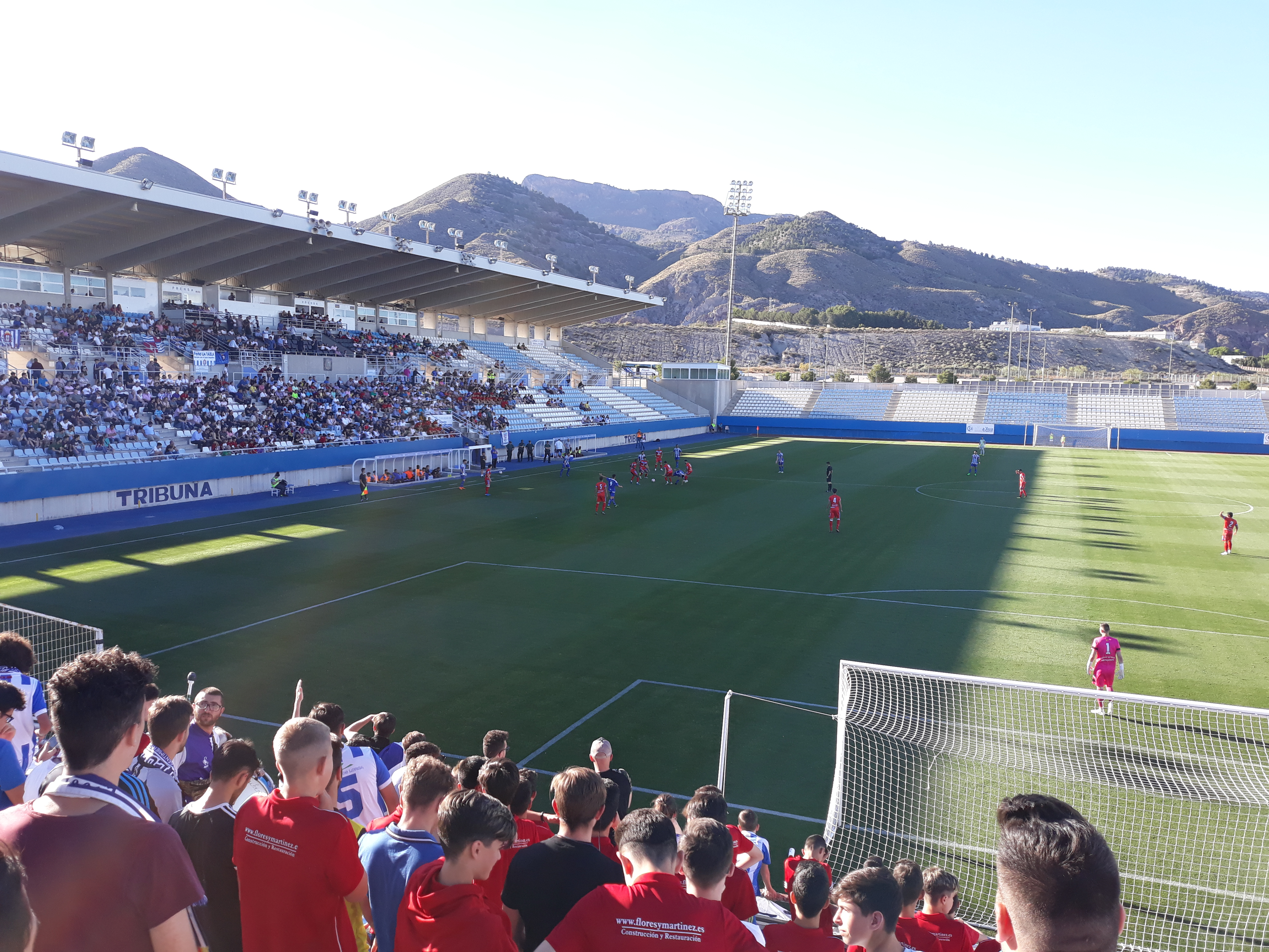 CF Lorca Deportiva - CD Sariñena (01-06-2019)